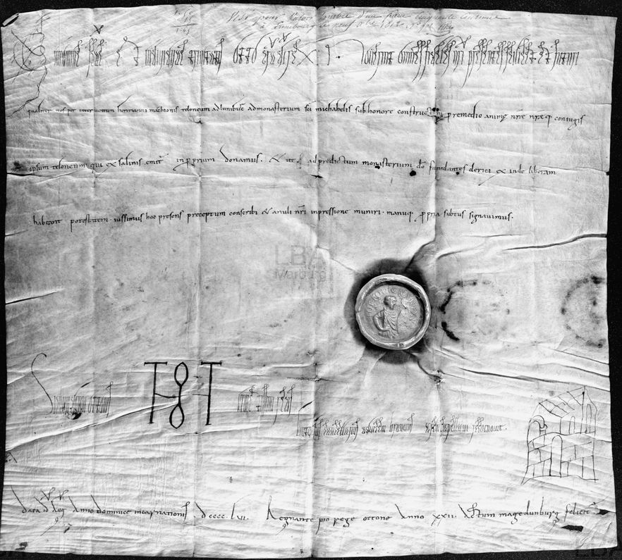 13. August 956, König Otto I. schenkt „den Zoll zu Lüneburg an das zu Ehren des heiligen Michaels errichtete Kloster“